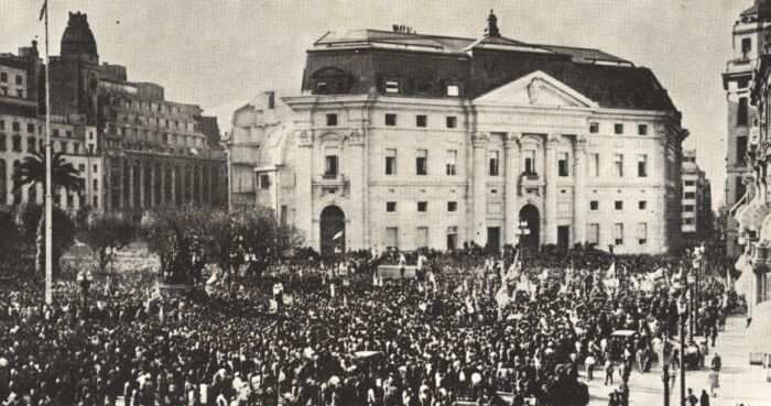 La movilización del 17 de octubre de 1945 reclamando la liberación del Coronel Juan Domingo Perón, frente a la Casa Rosada. Se destaca en el fondo el edificio del Banco de la Nación Argentina en construcción.